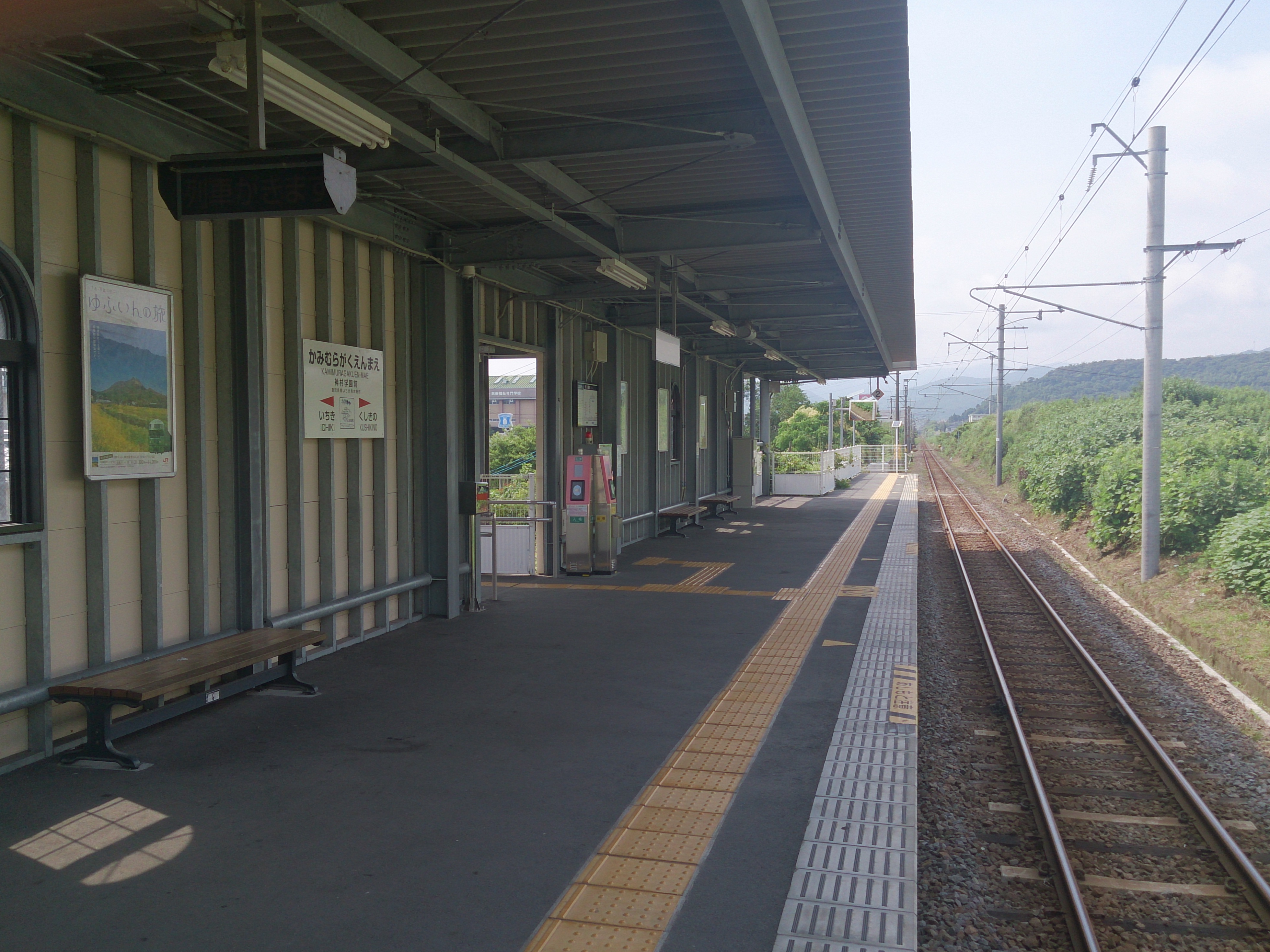 神村学園前駅ホーム